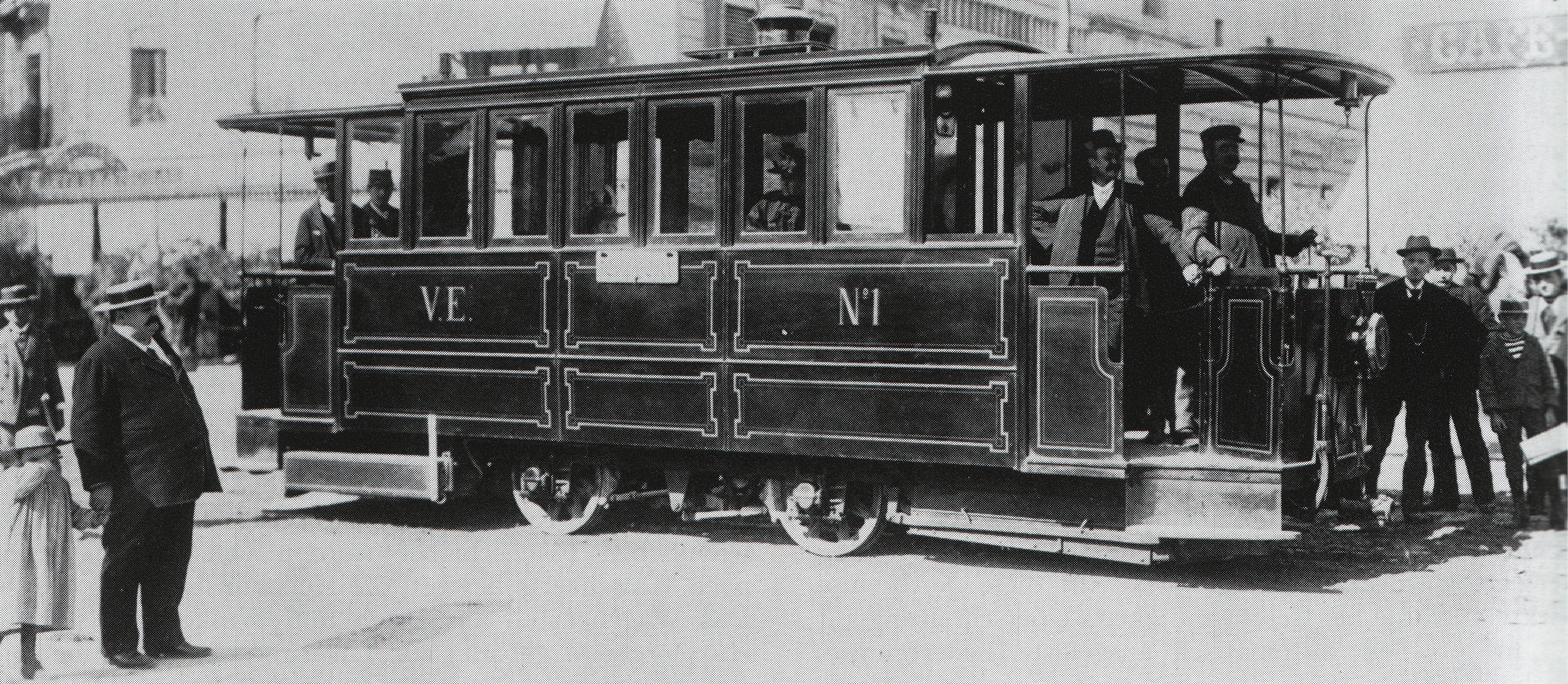 Dampftribwagen Nr. 1 der Genfer Straßenbahnen, gebaut 1896 inn der bahneignen Werckſtatt zů Genf, Dampf-Machine aus den Genfer Werckſtätten für phyſicaliſche Inſtrumente, Keſſel wahrſcheinlich von Serpollet, eingebaut inn der Machines-Baugeſellſchafft zů Baſel; 1900 außer Dienſt geſtellt und anſchließend abgebrochen.